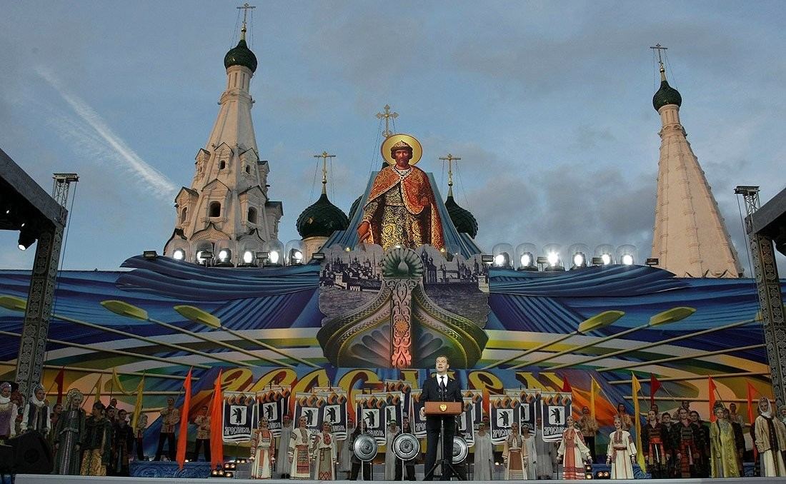 ЯРОСЛАВСКАЯ ОБЛАСТЬ, Ярославль. Выступление Дмитрия Медведева на концерте, посвящённом празднованию 1000-летию Ярославля.